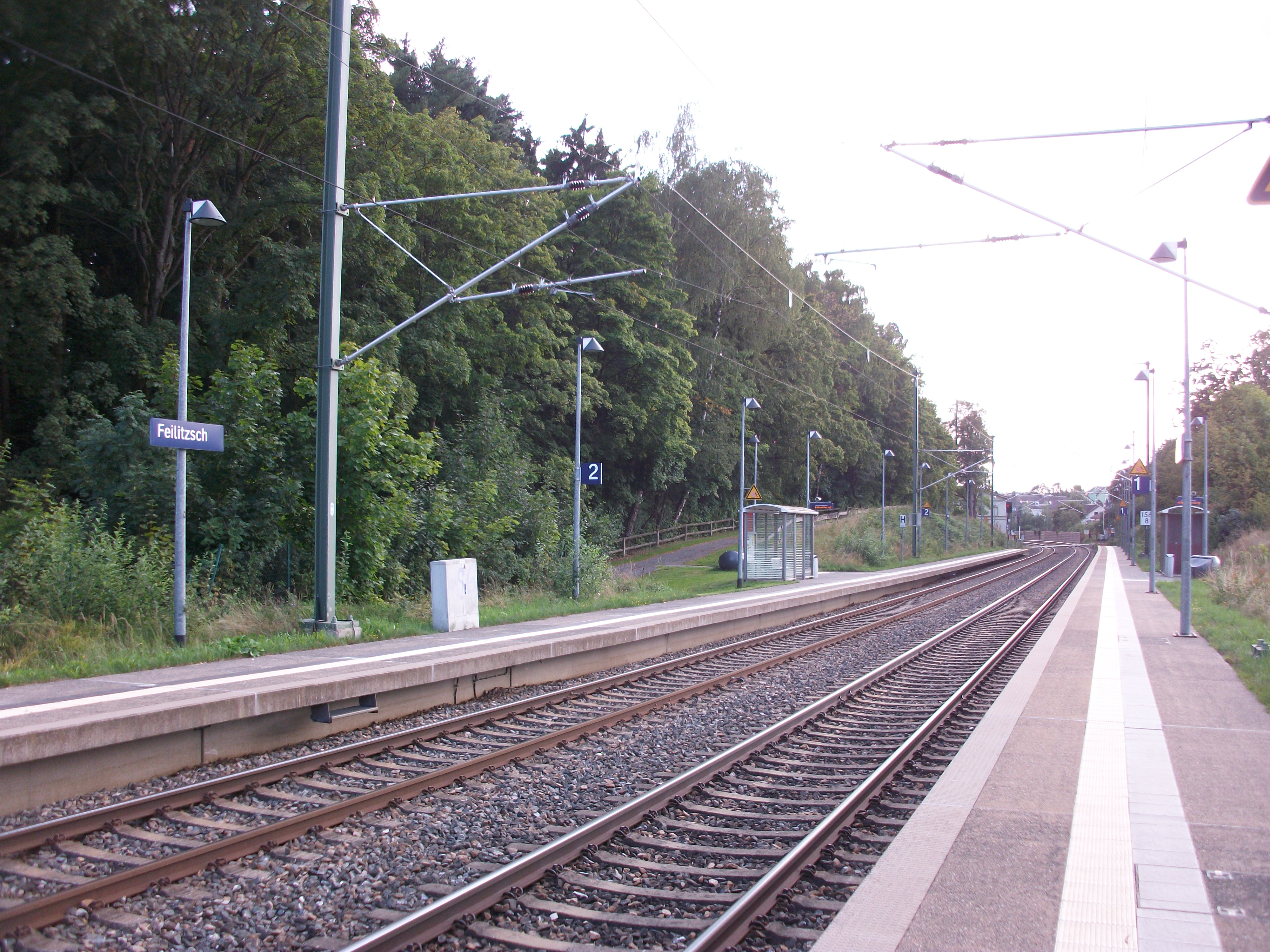 Haltepunkt Feilitzsch (neu) (2019)